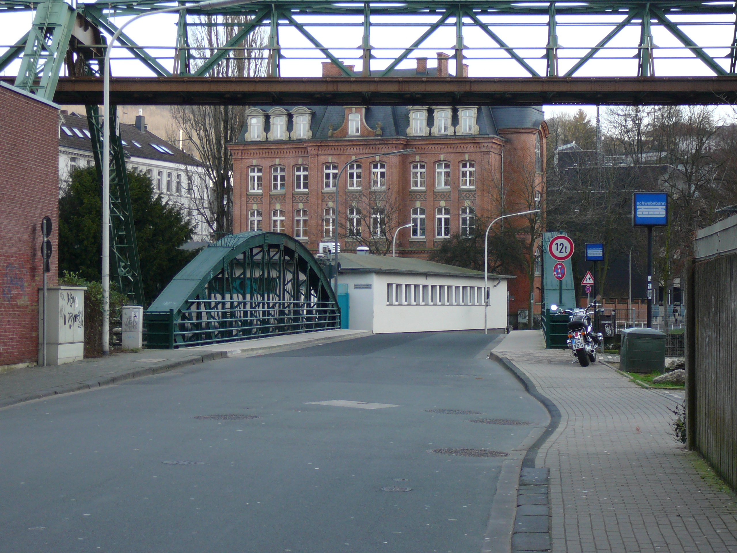 Wupperbrücke Pestalozzistraße